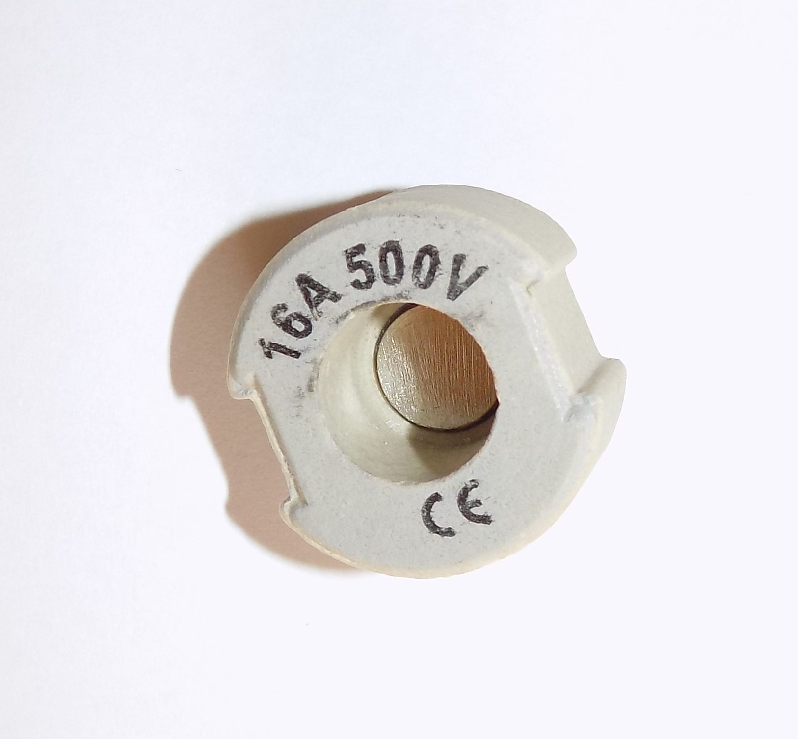 Diazedpasseinsatz, Bemessungsstrom 16A